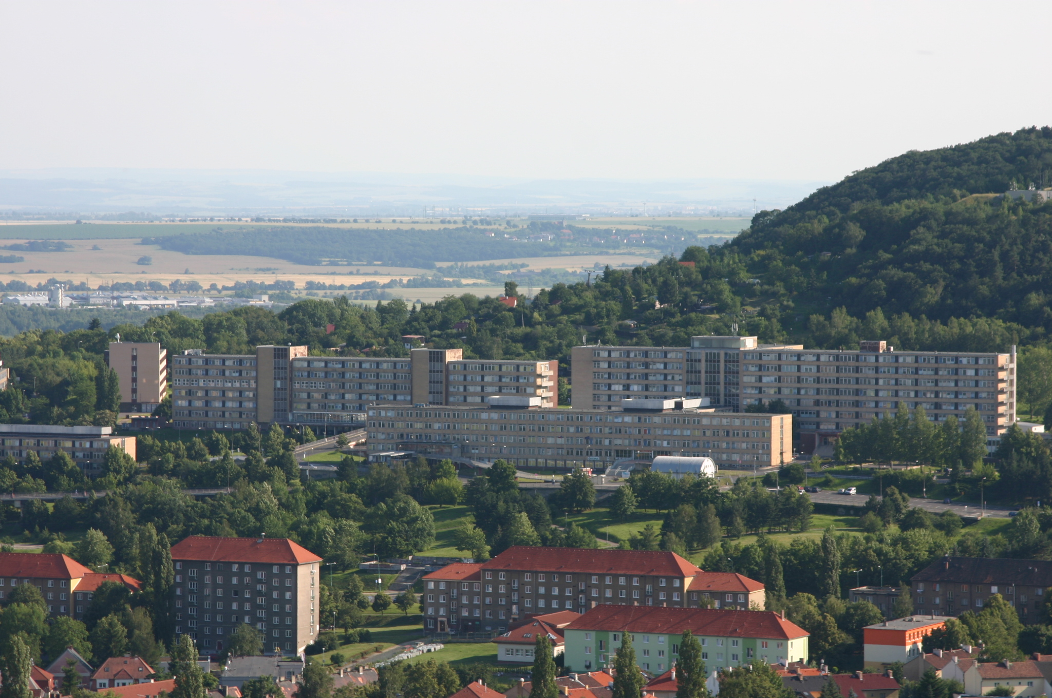 Nemocnice Most, pohled z Hněvína.